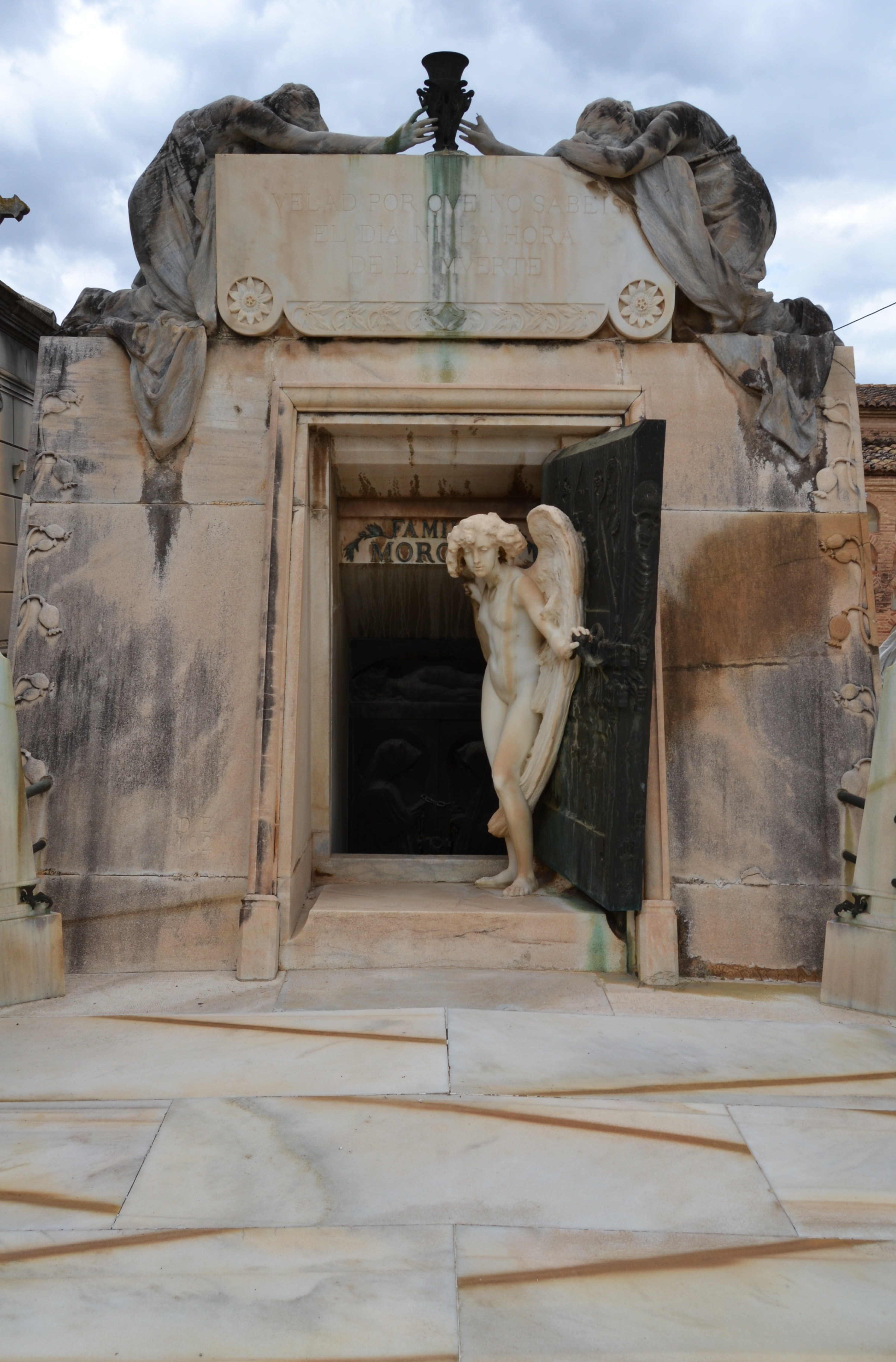 Panteó de la família Moroder, cementeri general de València.